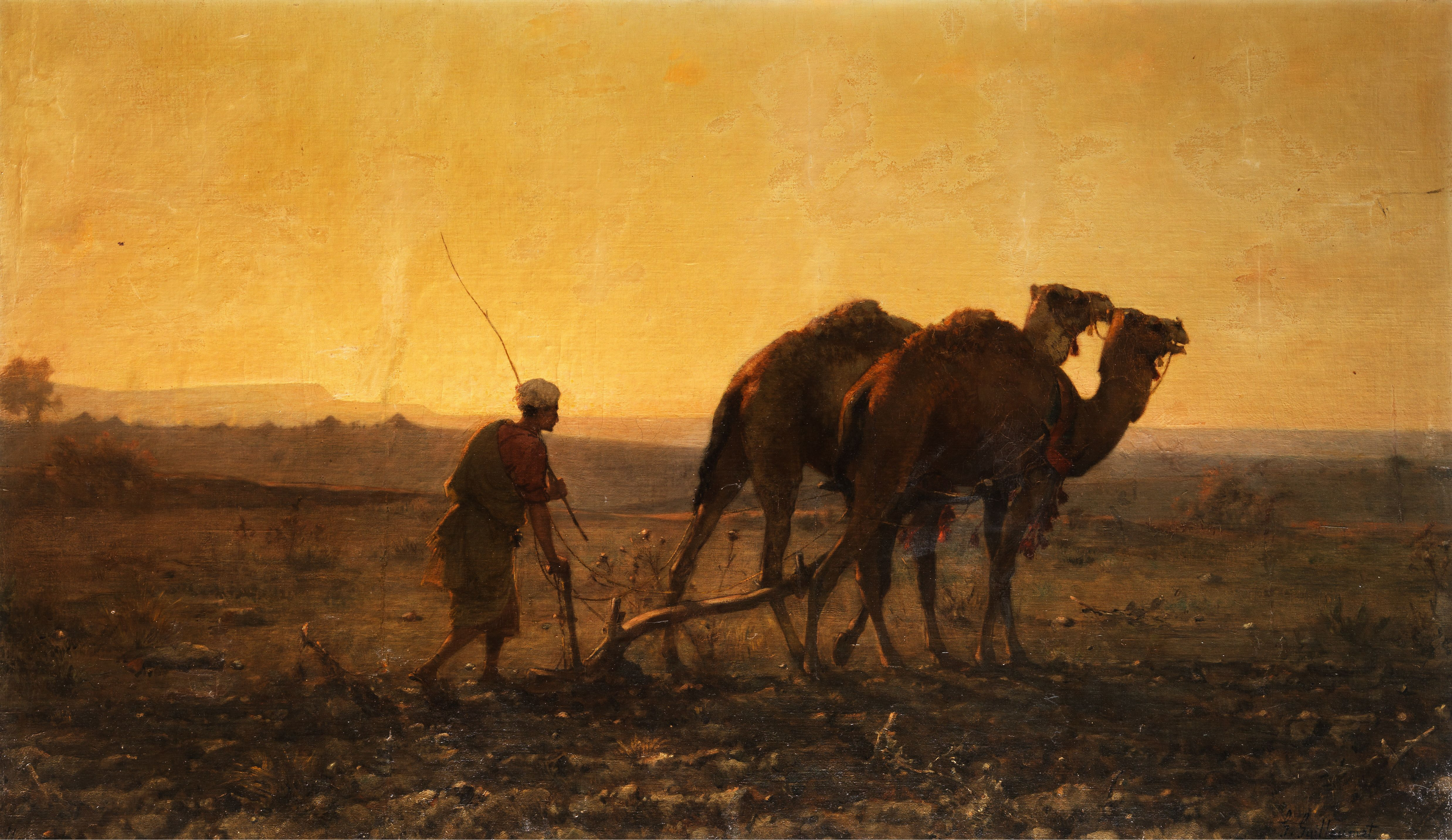 Pflügender Araber mit Dromedaren in abendlicher Landschaft. Öl auf Leinwand. 138 x 80,5 cm.